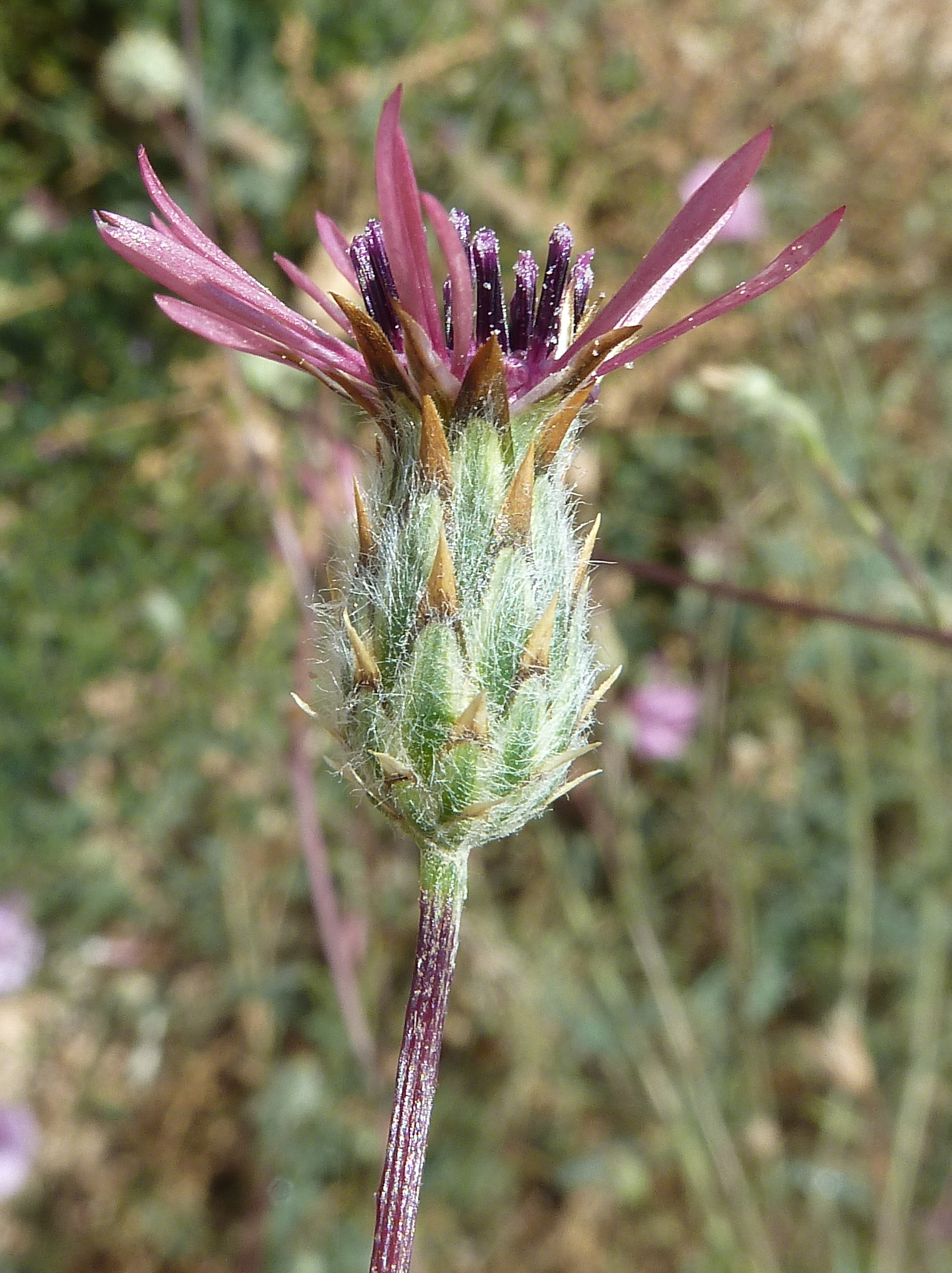 Volutaria tubuliflora - Capítulo en antesis - Camino de San Cayetano, Albatera (Provincia de Alicante, España))